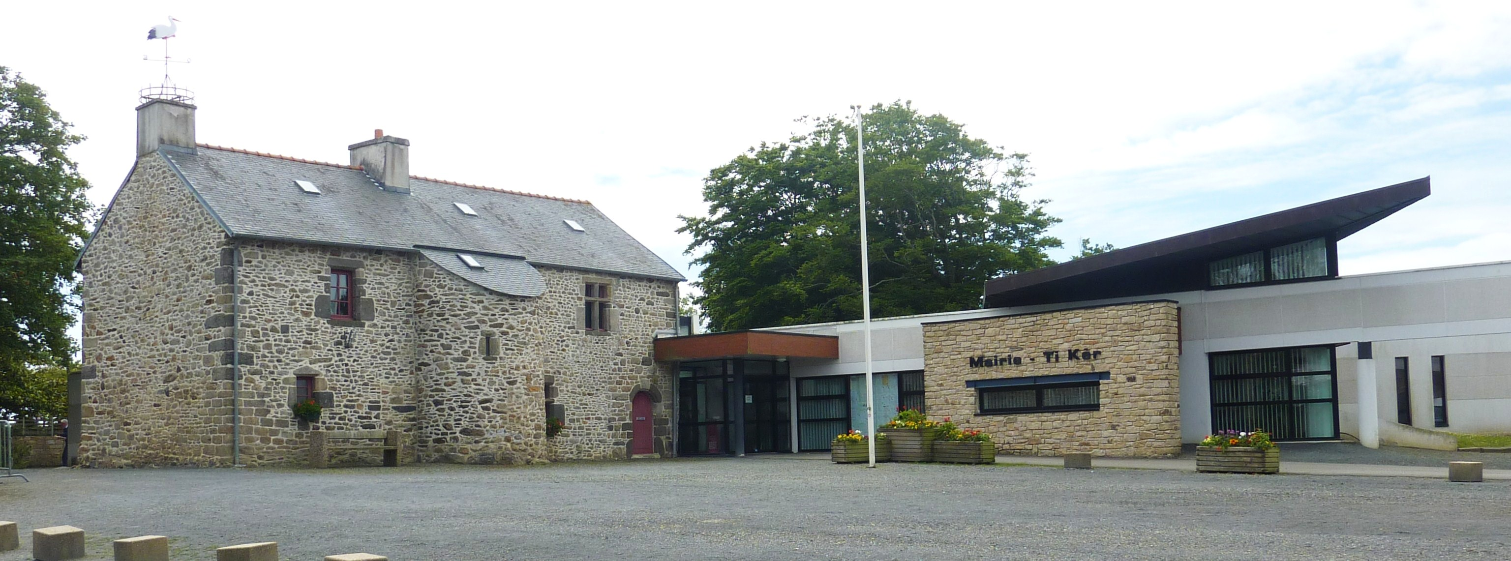 Ploudaniel : la mairie